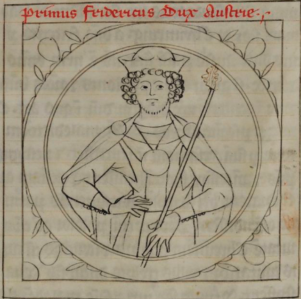 Friedrich II. von Österreich